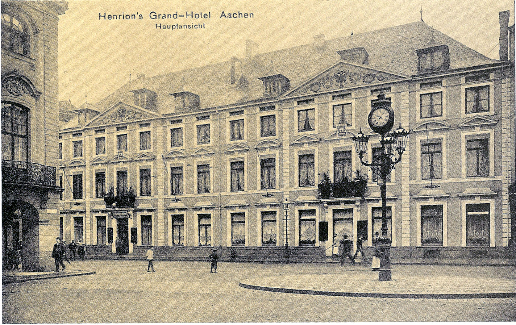 Das Grand-Hotel "Corneliusbad", Anfang des 20. Jahrhunderts auf der Komphausbadstrasse